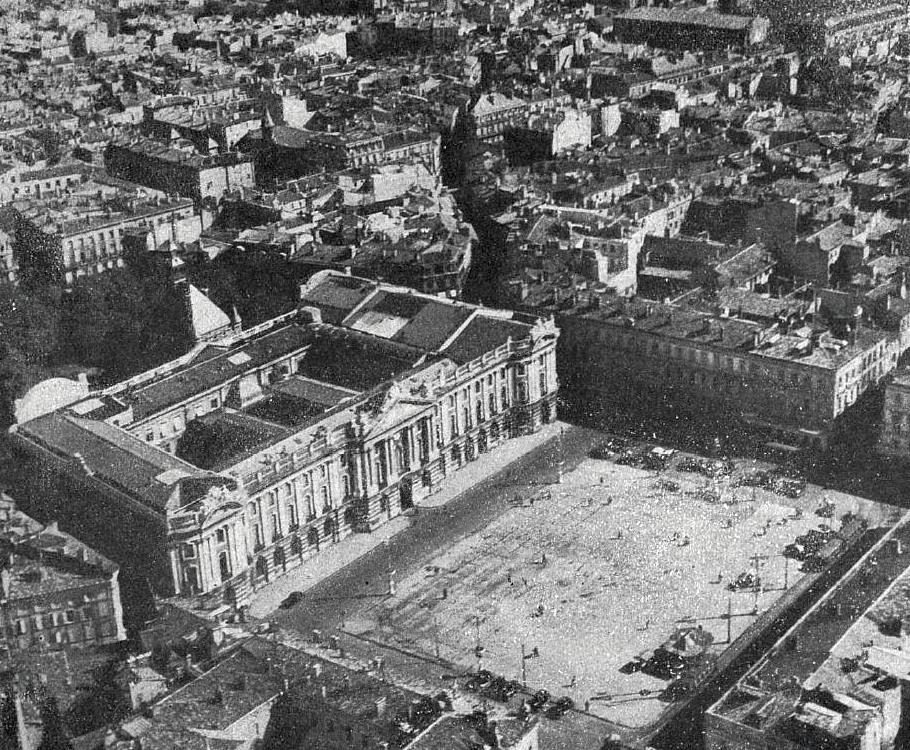 La Place du Capitole de Toulouse, en octobre 1948